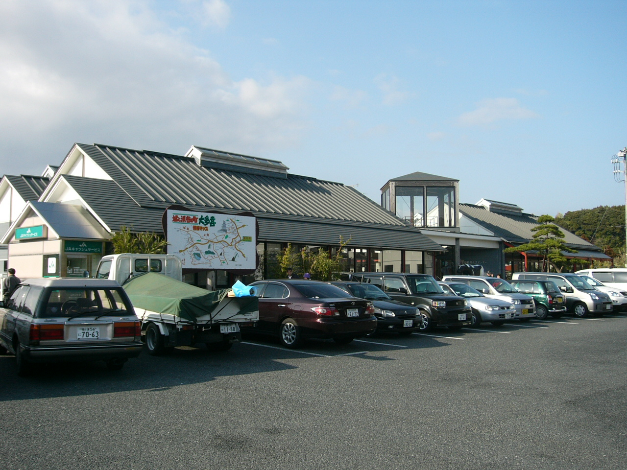 Michinoeki Takeyura no Sato Otaki (道の駅たけゆらの里おおたき Chiba)